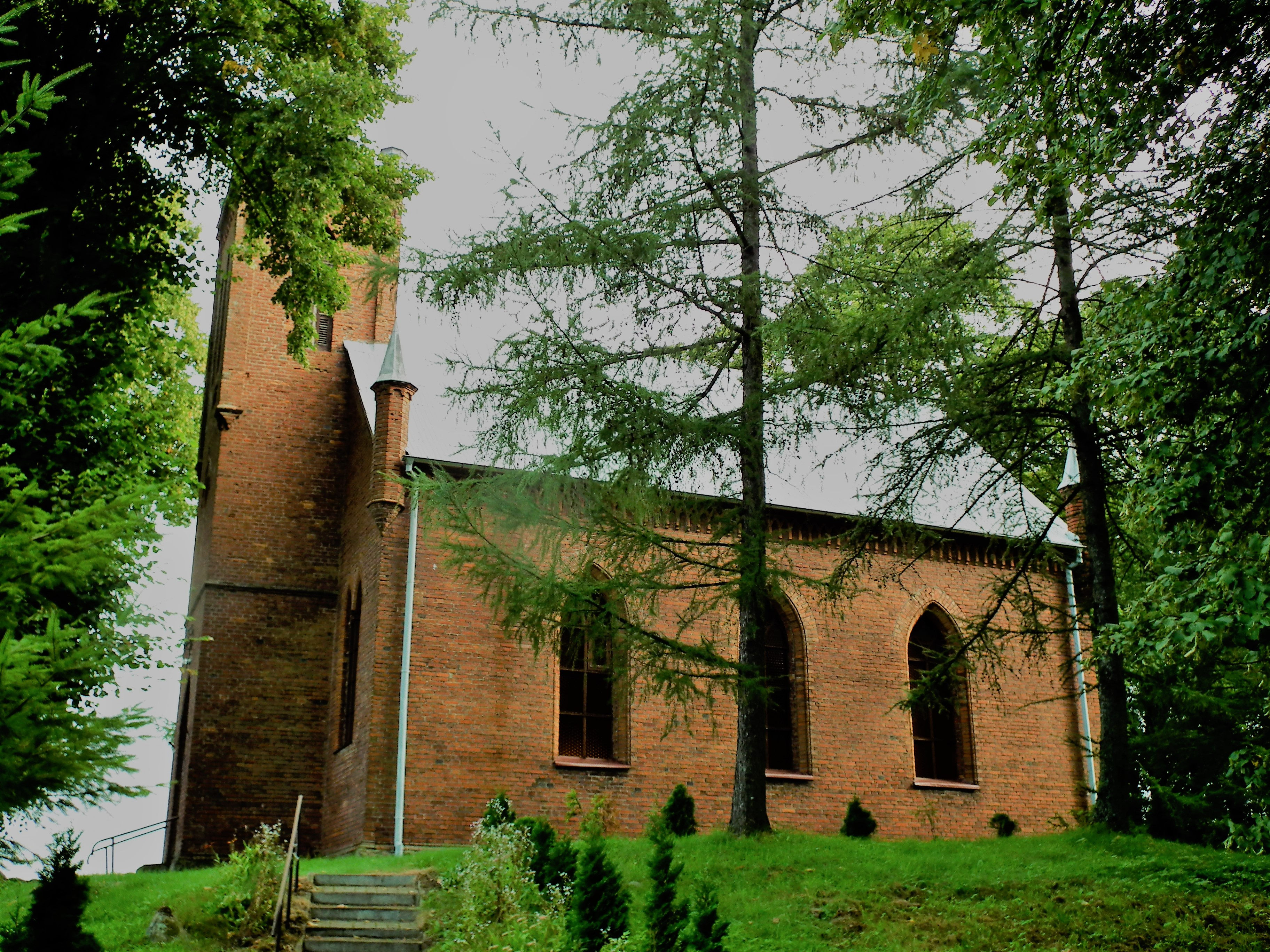 Kościół w Rzepowie.